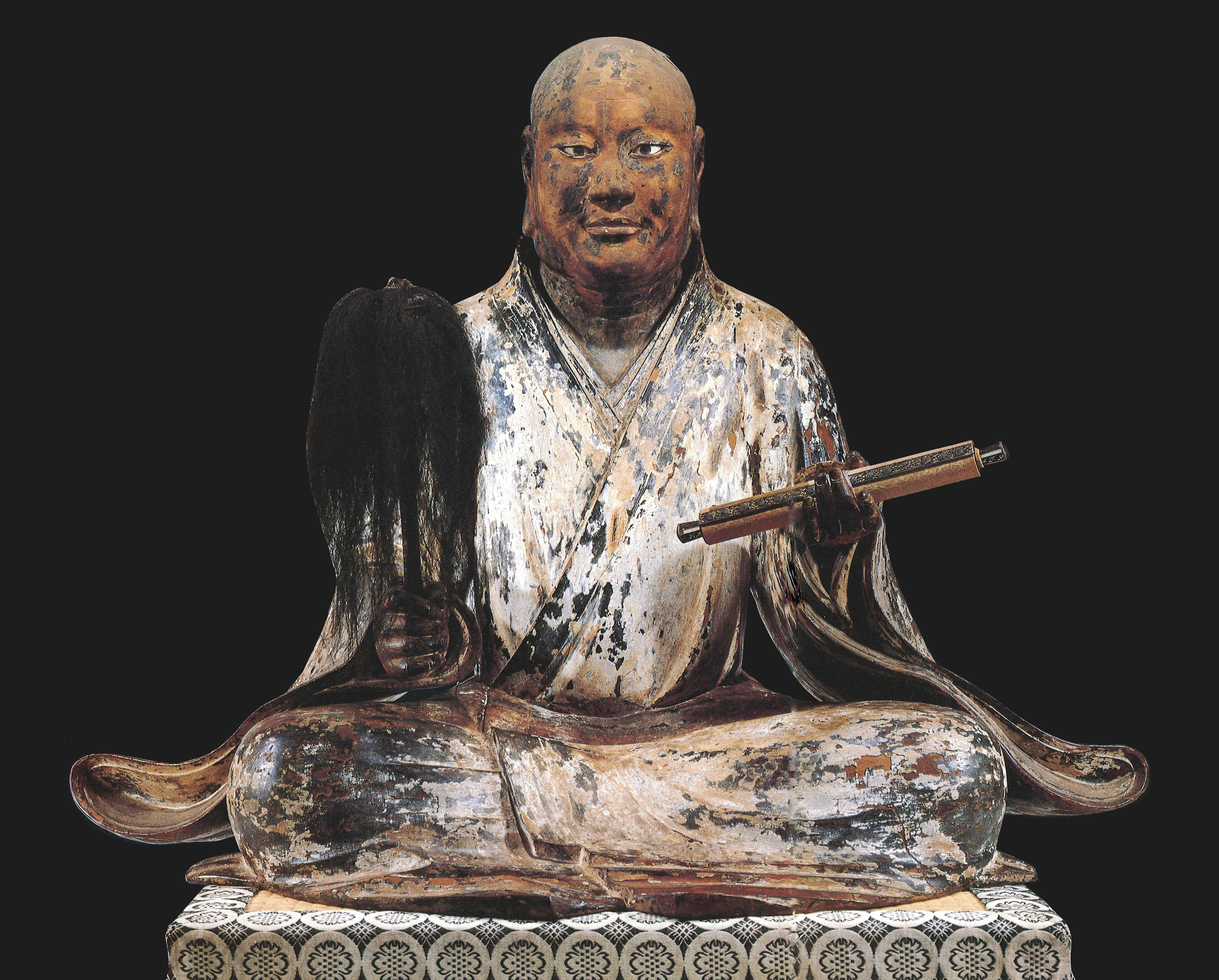 池上本門寺御影